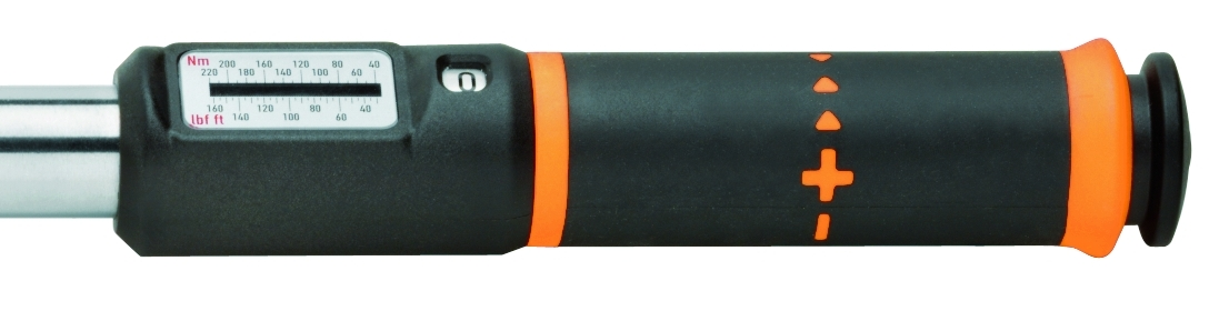 Drehmomentschlüssel (Detail)